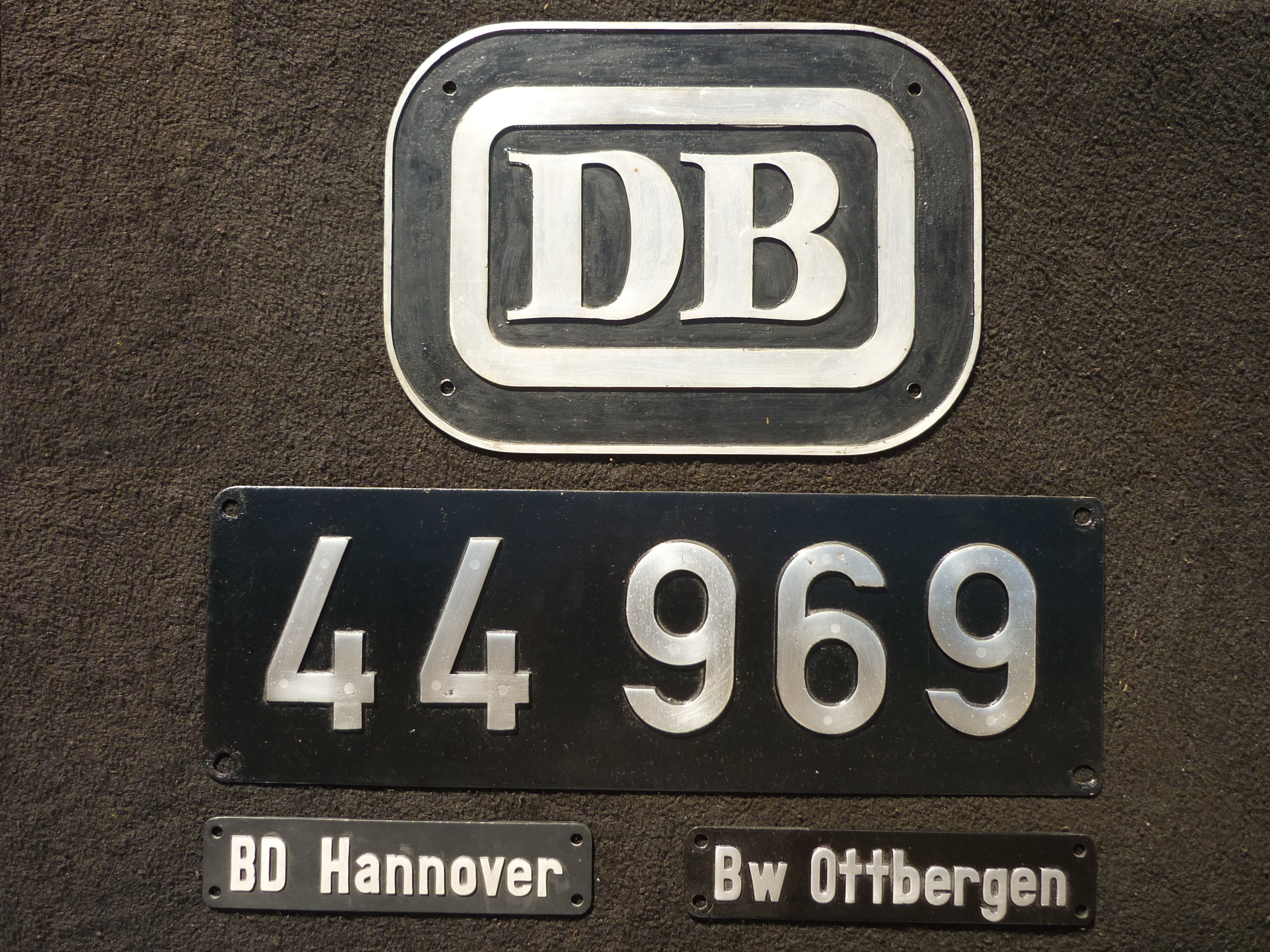 Staatsbahn (DB), Loknummer (Typ 44), Ordnungsnummer (969), Bahndirektion (BD), Bahnbetriebswerk (Bw).